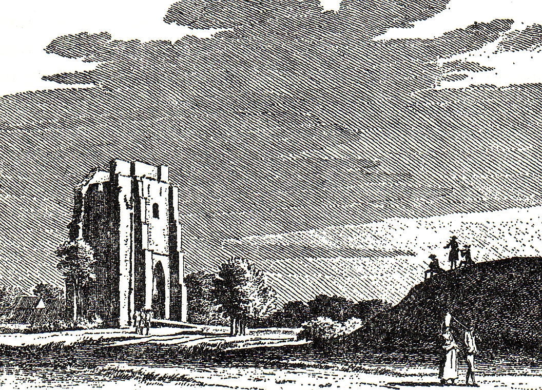 Kerk Westschouwen